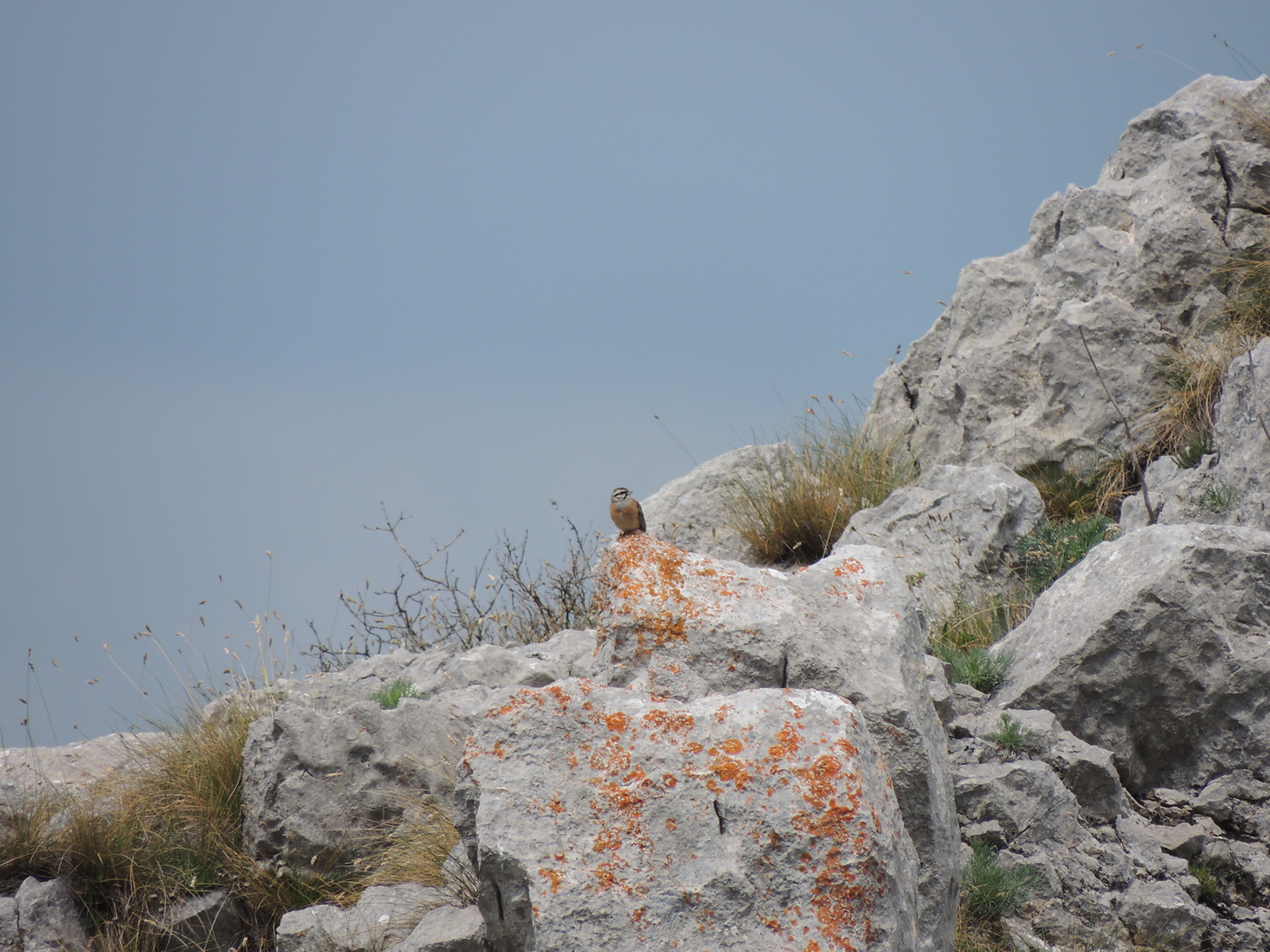 Srpski naziv strnadica kamenjarka Opis vrste D.t. 15-16,5cm. Rasprostranjena je u brdsko planinskim predelima južne i manjeg dela centralne Evrope, severozapadne Afrike, male Azije, Bliskog Istoka, Kavkaza i istočnog dela himalajskog platoa. U zimskom periodu, veliki deo ptica iz planinskih predela spušta se u ravničarske predele. Naseljava strma i otvorena brdska i planinska staništa sa kamenjarima, liticama, travama i retkim drvećem i žbunjem na različitim nadmorskim visinama. Gnezdo smešta na tlo, skriveno među kamenjem i vegetacijom. Hrani se pretežno semenjem različitih vrsta biljaka i beskičmenjacima. U Srbiji je redovna gnezdarica klisura i kamenjara u brdsko-planinskom delu zemlje. Gnezdeća populacija u Srbiji se procenjuje na 3.000 - 4.000 parova (Puzović et al 2009). Status zaštite vrste IUCN crvena lista - Kategorija LC; Ptice od posebnog značaja za zaštitu u Evropi: SPEC 3; Konvencija o očuvanju evropske divlje flore i faune i prirodnih staništa - Annex I; Pravilnik o proglašenju i zaštiti strogo zaštićenih i zaštićenih divljih vrsta biljaka, životinja i gljiva: Prilog I Strogo zaštićene divlje vrste biljaka, životinja i gljiva